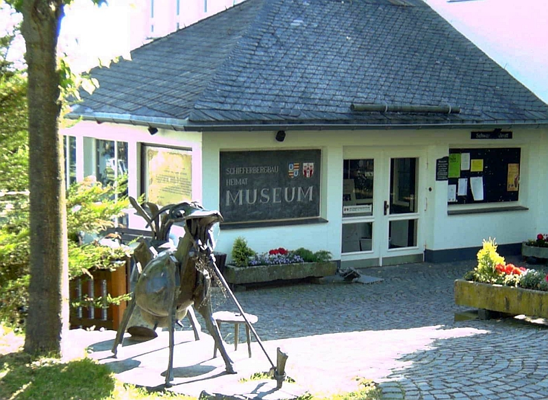 Eingang Schieferbergbau- und Heimatmuseum in Holthausen (Schmallenberg), Germany.